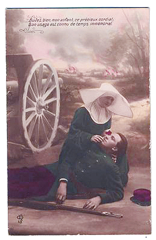 Le vin cordial durant le Grande Guerre